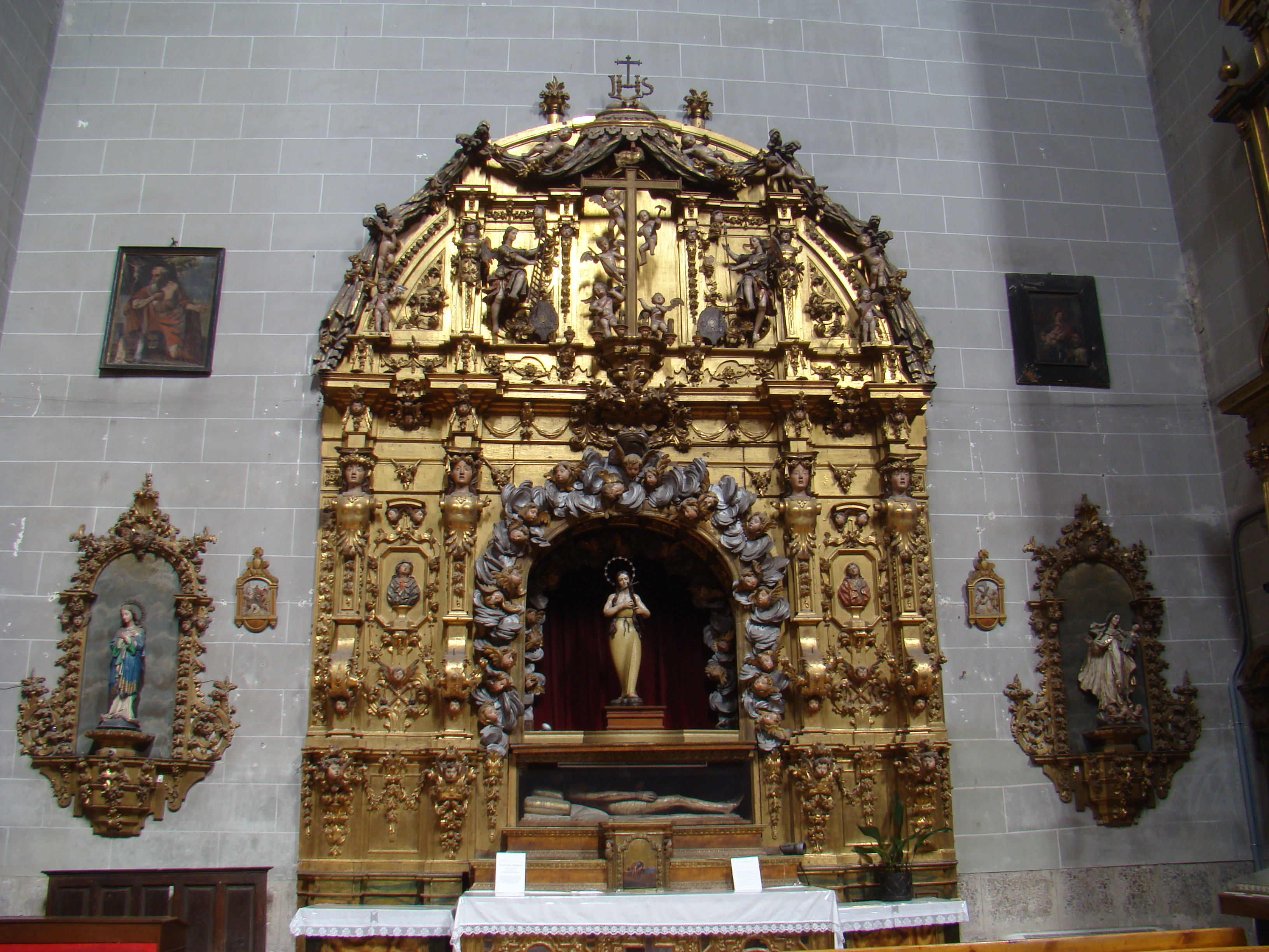 Iglesia de la Magdalena en Valladolid, España. Retablo barroco del Santo Sepulcro procedente del desaparecido Hospital de la Resurrección. Estaba situado en la capilla propiedad de la Cofradía del Santo Sepulcro.